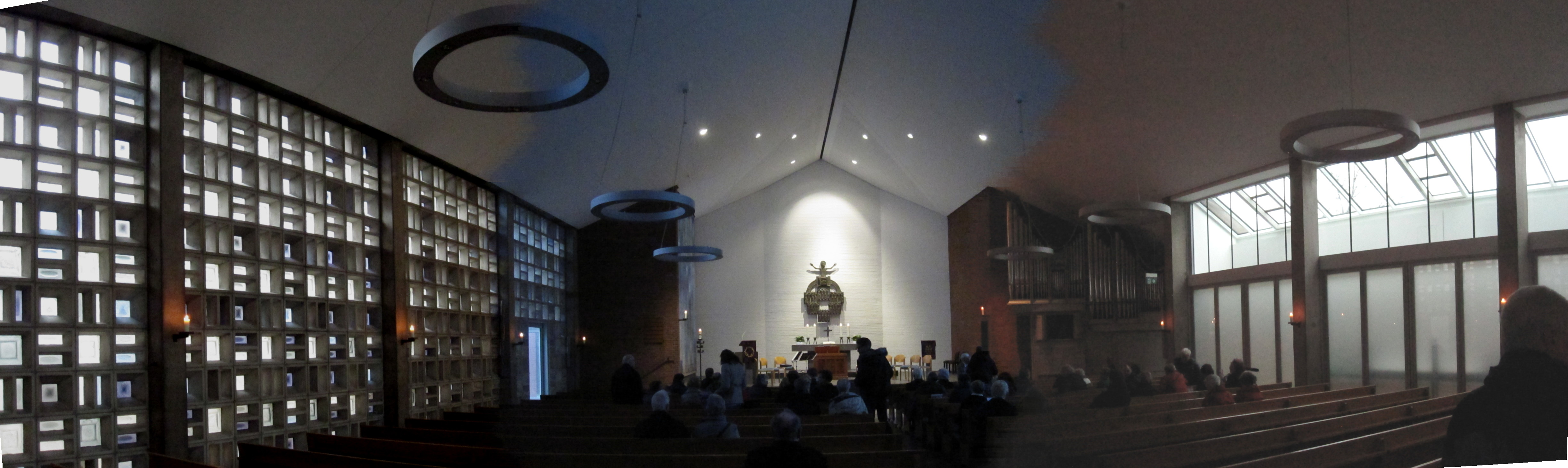 Matthiaskirche (Groß-Buchholz): Konzert am 29. März 2015, Dietrich Buxtehude, Membri Jesu nostri, aufgeführt vom Vokalensemble aus Hannover Vierklang und vier Instrumentalist_innen.